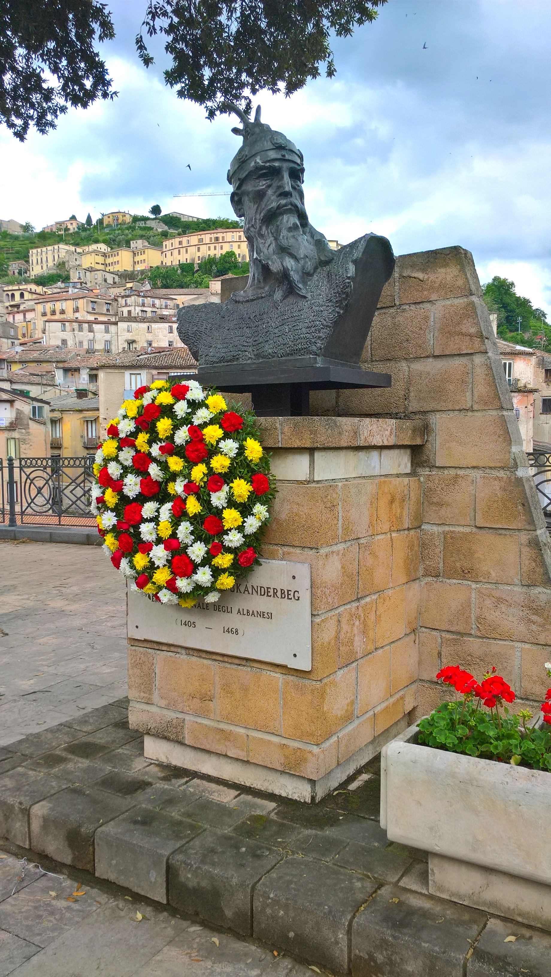 Skanderbegstatue in Cosenz, Kalabrien